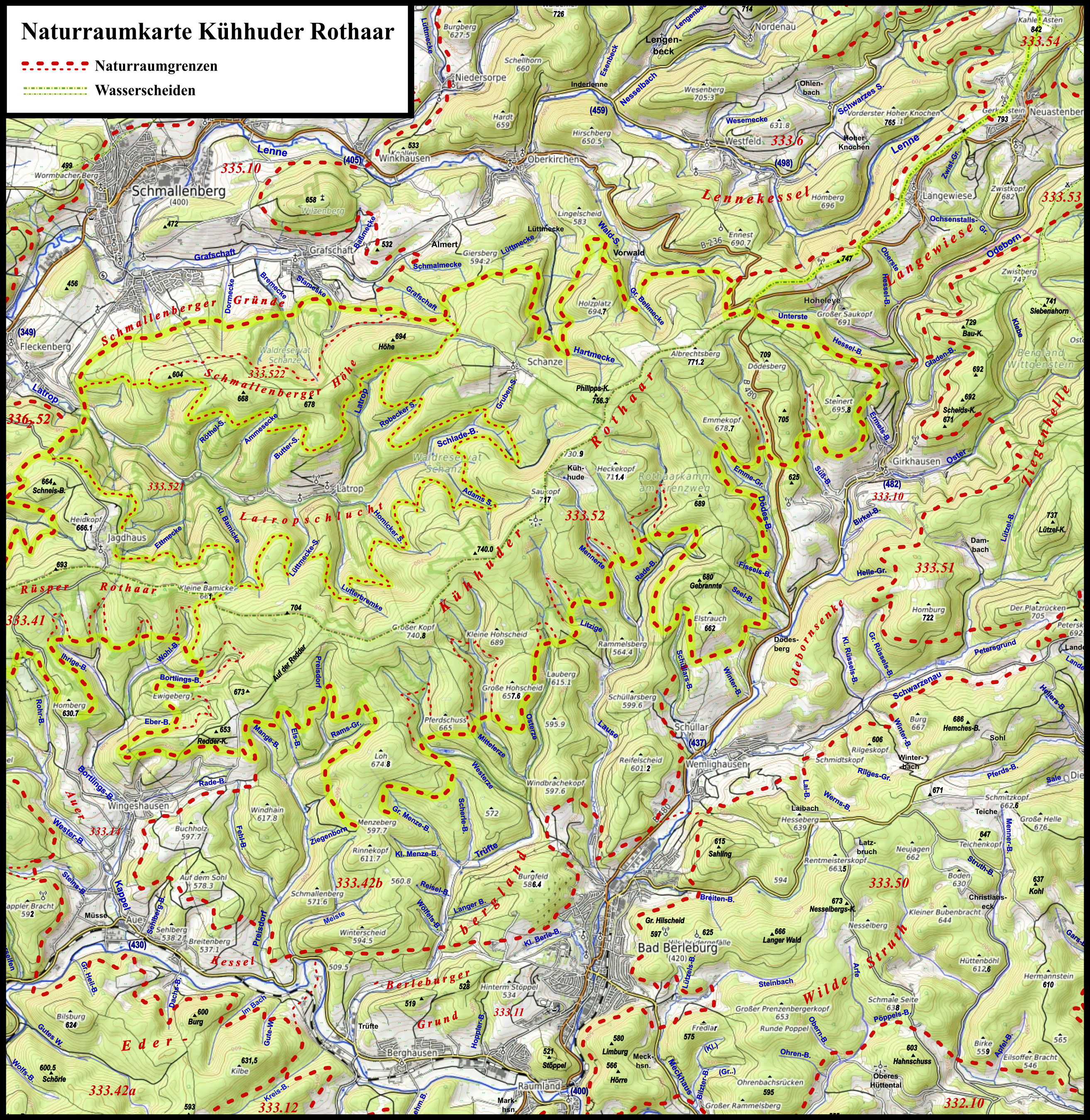 Naturraumkarte der bis 771,2 m hohen Kühhuder Rothaar im Rothaargebirge mit Schmallenberg im westlichen Norden und Bad Berleburg im östlichen Süden nebst Nachbarnaturräumen; die Wasserscheide nordostwärts zum Kahlen Asten ist ebenfalls hervorgehoben, ebenso die Rüsper Rothaar als südwestliche Fortsetzung.